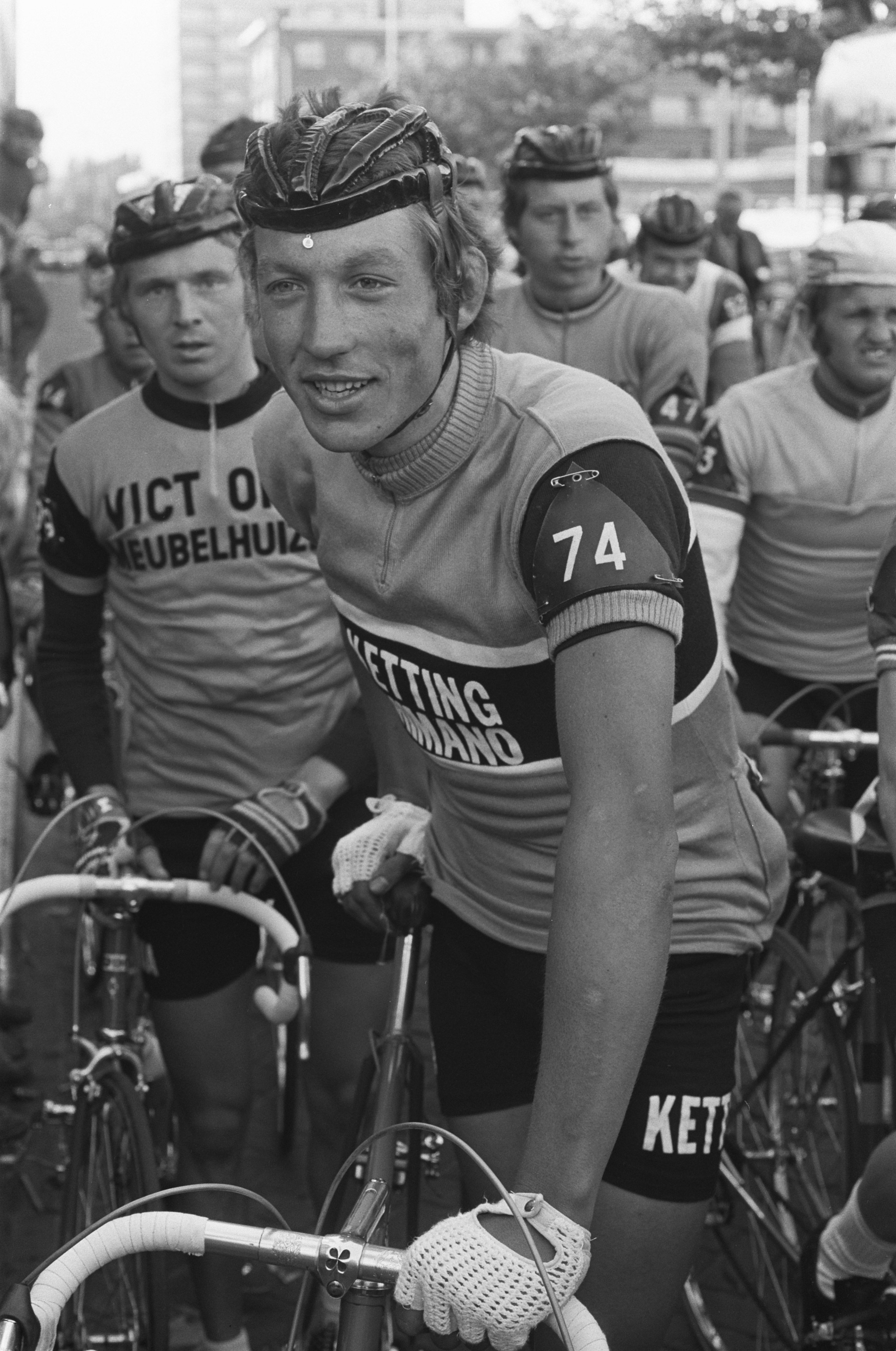 Aad van den Hoek avant le prologue de l'Olympia's Tour 1974.